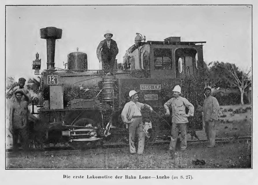 Erste Lokomotive der Bahn Lome-Aneho (Togo)